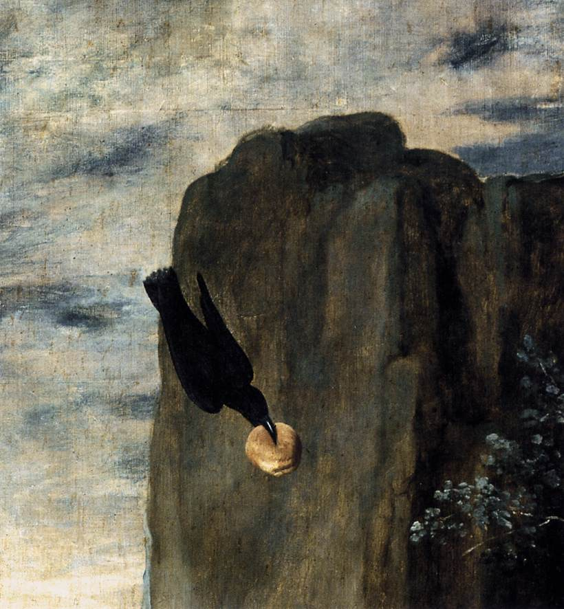 La obra representa a San Antonio Abad junto a San Pablo el Ermitaño, y está inspirada en un pasaje de La leyenda dorada de Jacobo de la Vorágine en el que se describe el viaje de San Antonio Abad hizo para visitar a San Pablo, el primer ermitaño cristiano en el desierto de Egipto.